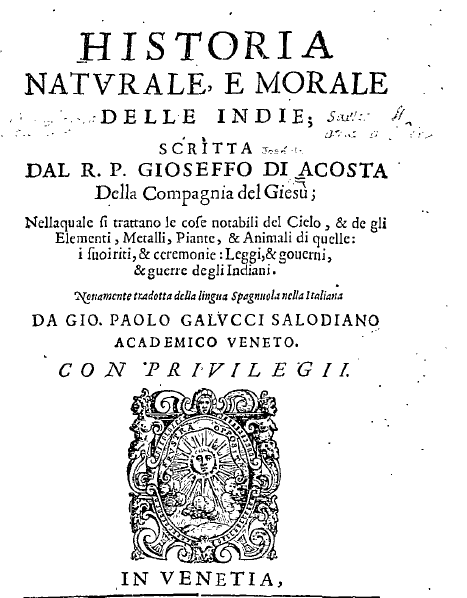 Portada del libro de José de Acosta, Historia Natural y Moral de las Indias en italiano